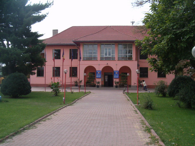 Primaria Bechet